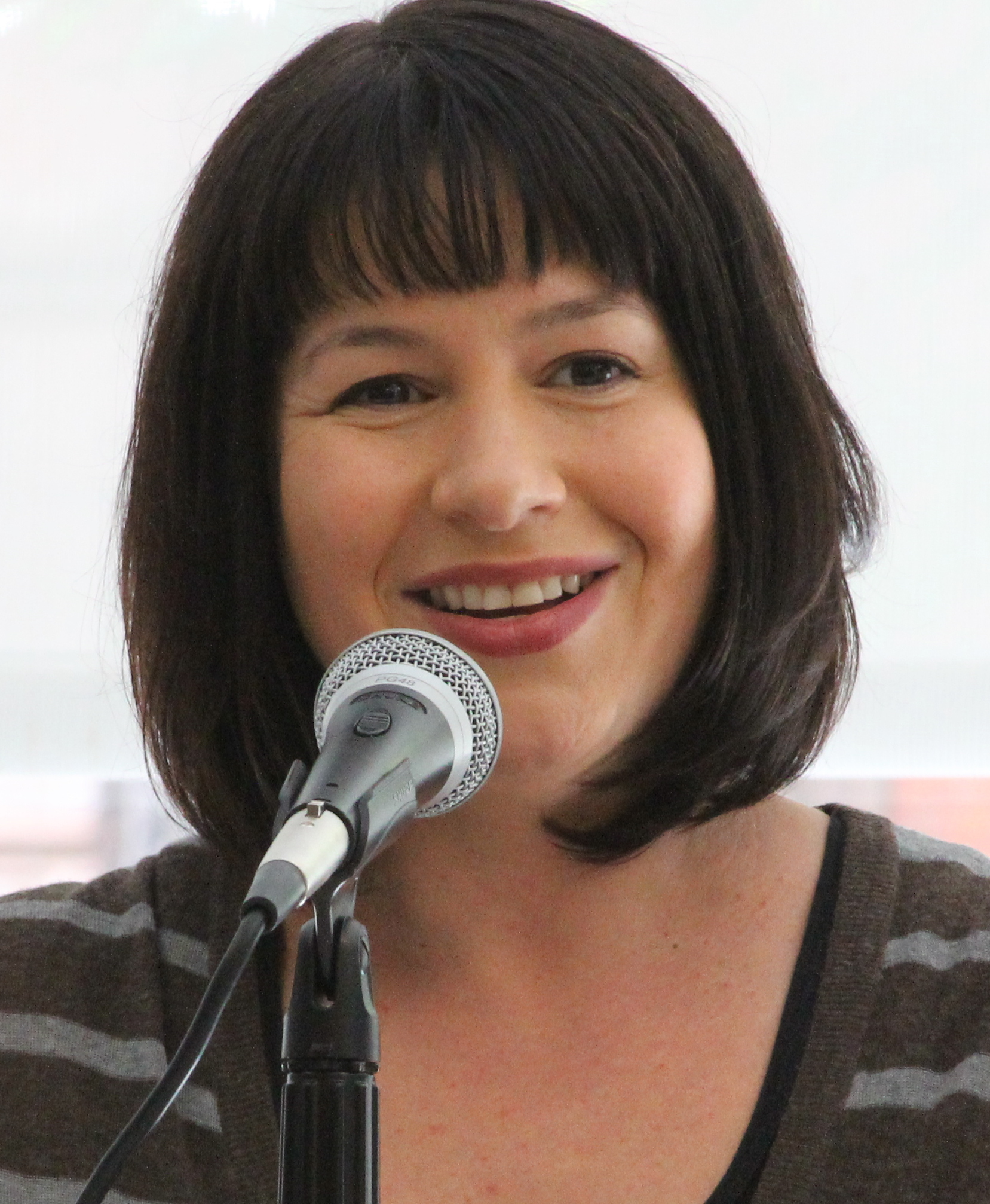 Michelle Goldberg @ BBF